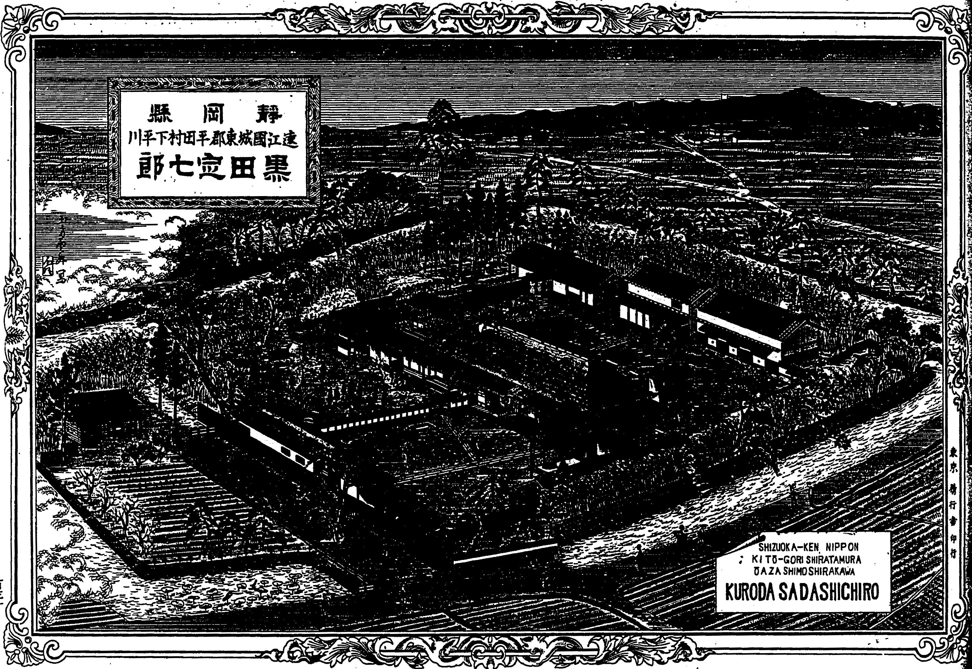 靑山豊太郎編『日本博覧圖――靜岡縣』初篇、精行舎、1892年。